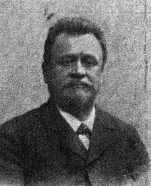 Österreichischer Politiker, Reichsratswahl 1907, Name siehe Dateiname